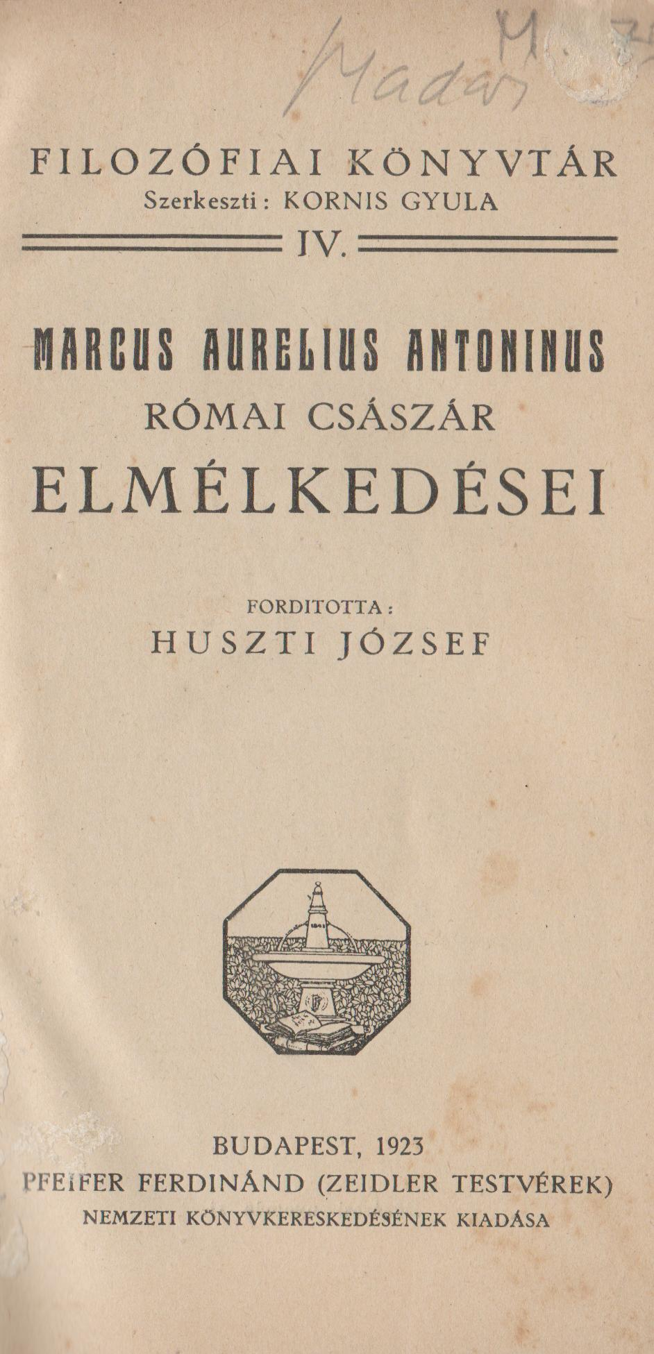 Az adott mű címlapja.